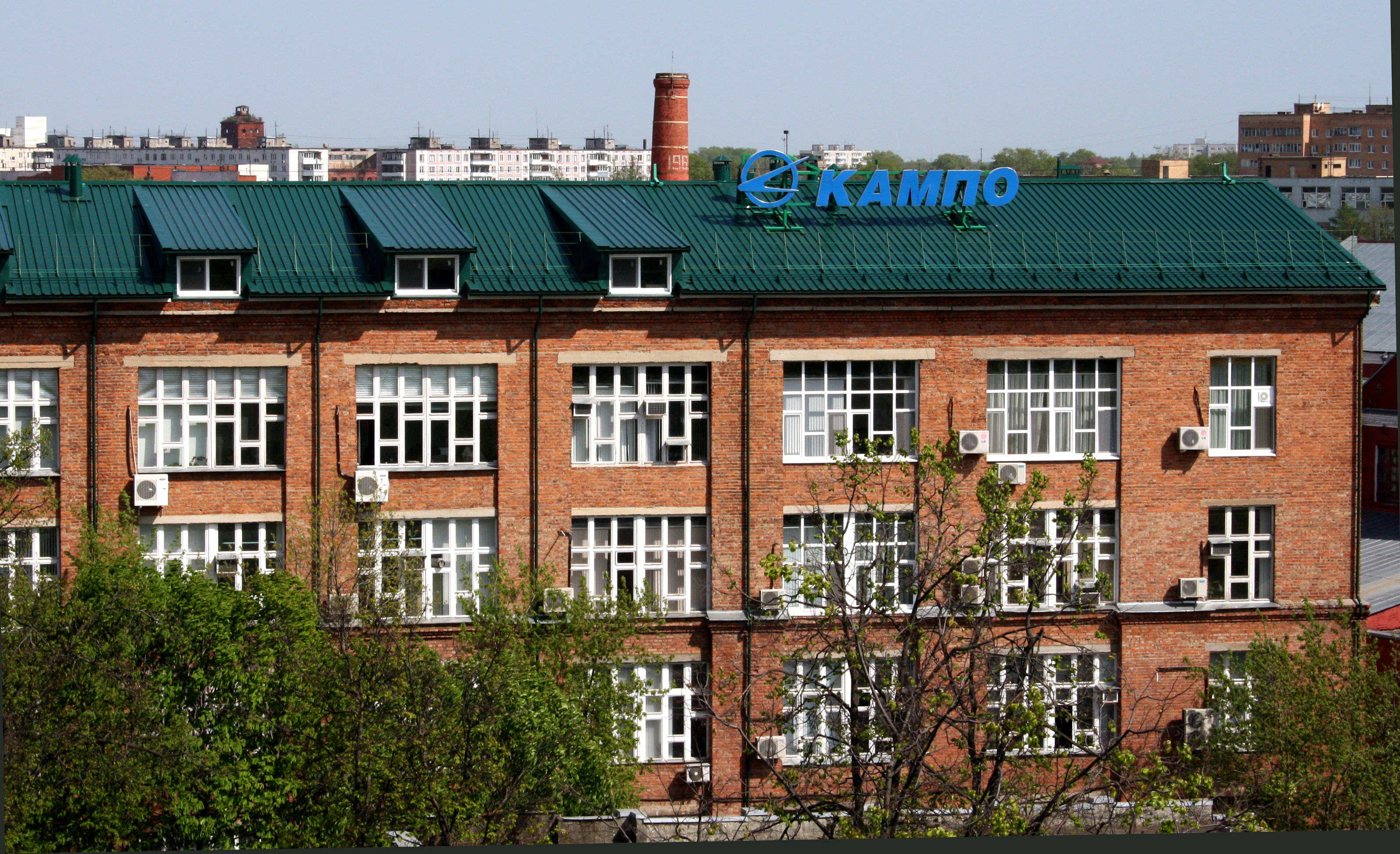 Здание ОАО "КАМПО"